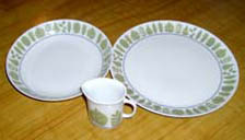 Tallrikar. Dekor och form: "Sylvia" från Karlskrona Porslinsfabrik av Barbro Örtendahl.